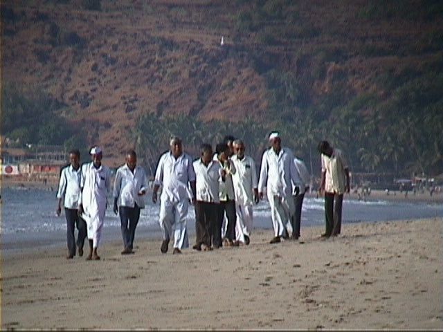 eigen foto gemaakt in Goa India (2004)